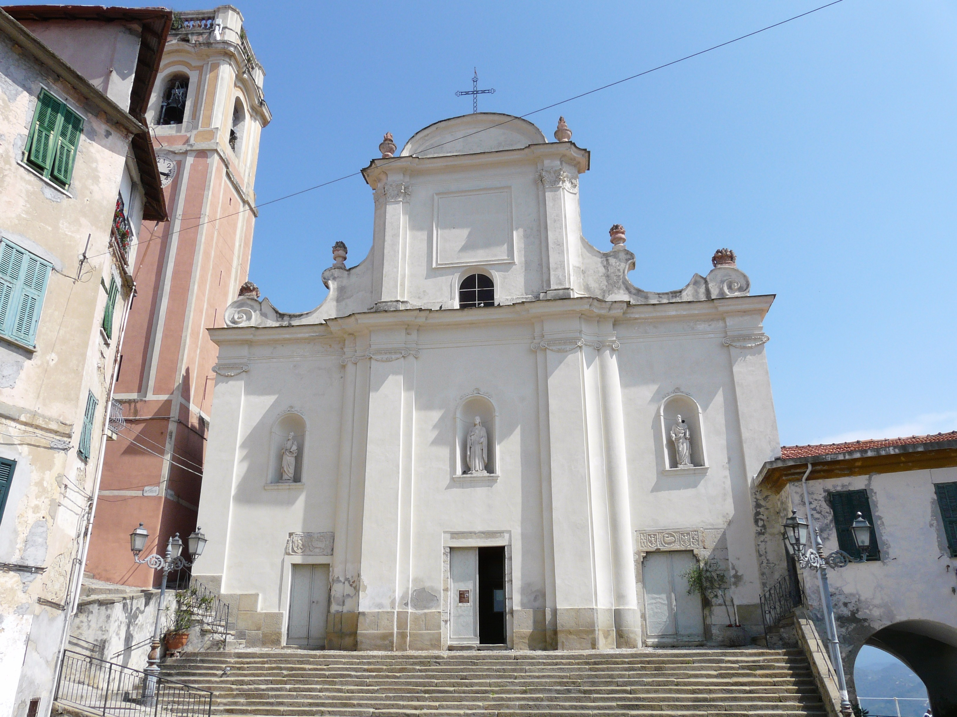 Chiesa di San Nicolò di Perinaldo, Liguria, Italia